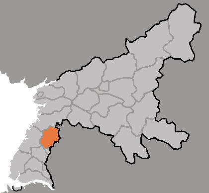 Map of Daedong, Pyongan-namdo, DPRK, 2006